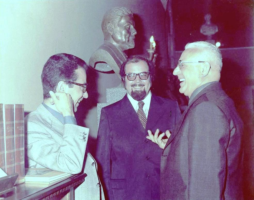 Vincenzo Pirro (a sinistra) e Hervè Cavallera (centro) ripresi durante il convegno dedicato al pensiero di Giovanni Gentile presso l'Istituto dell'Enciclopedia Italiana a Roma nel 1977.